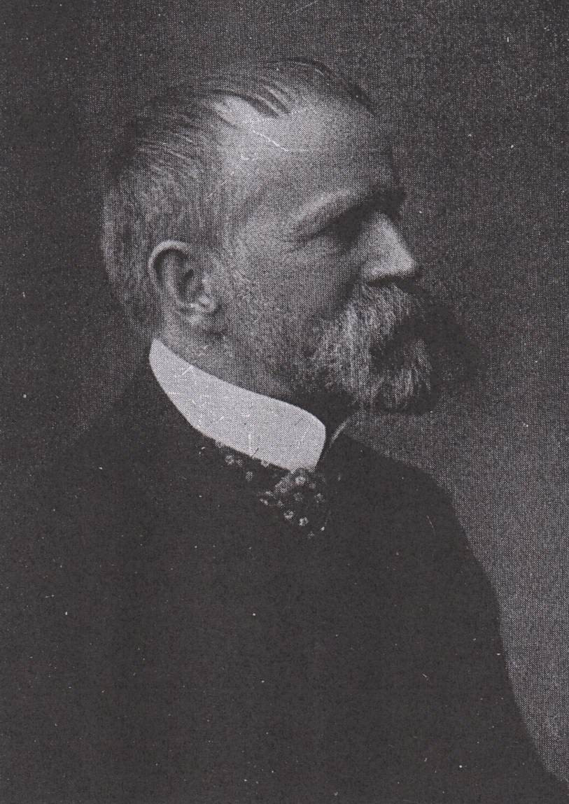 Fritz von Uhde (1848-1911), german painter